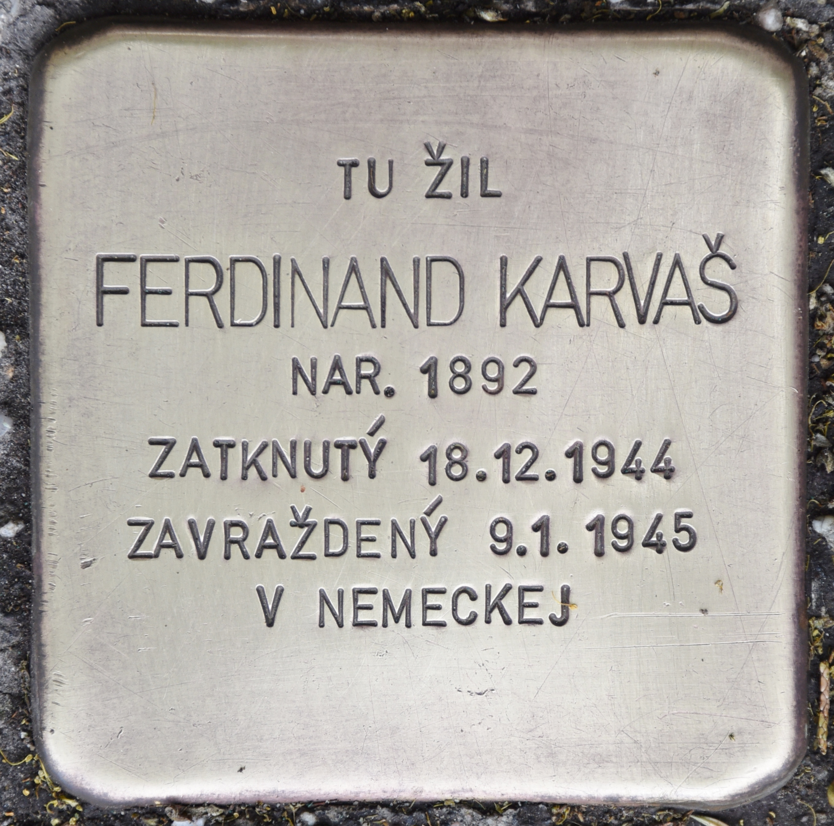 Stolperstein für Ferdinand Karvas